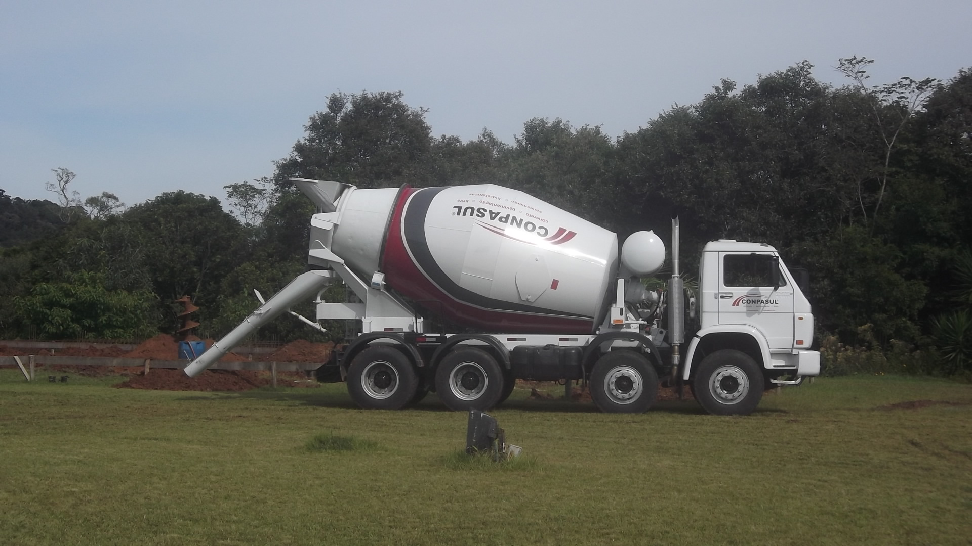 Mosteiro Beneditino Santíssima Trindade